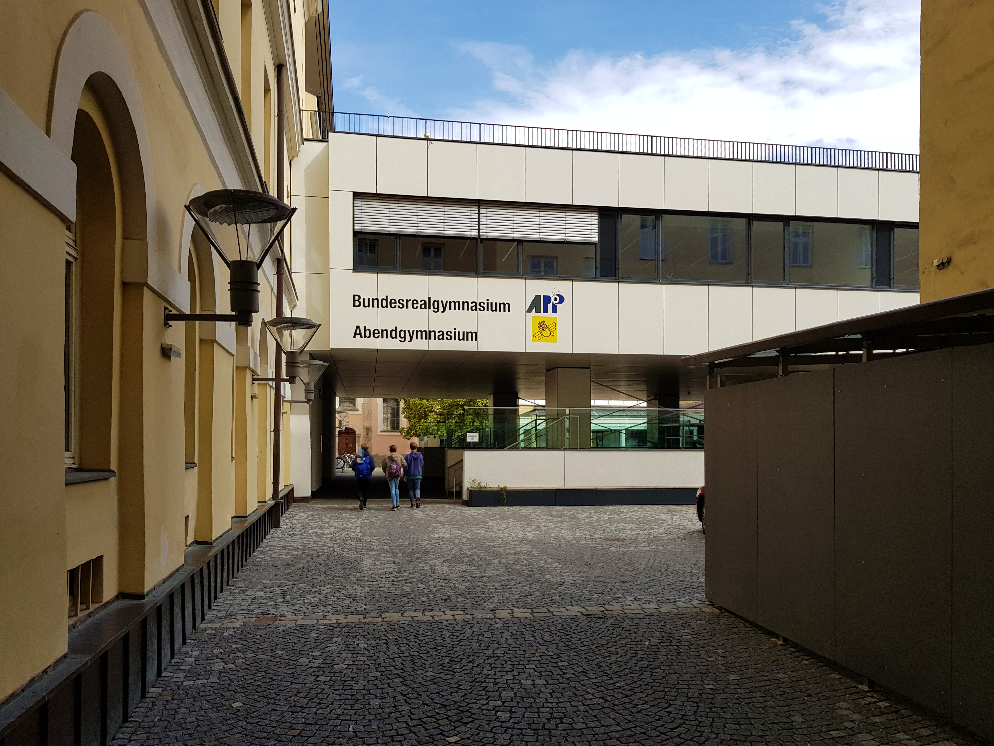 Bundesrealgymnasium Innsbruck: Innenhof